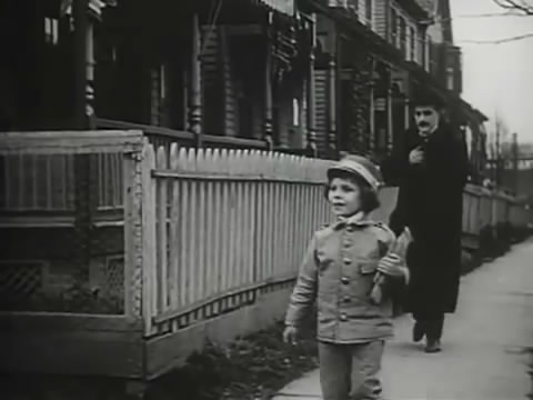 photo du film "The Evidence of the Film" (1913, Marston & Thanhouser)